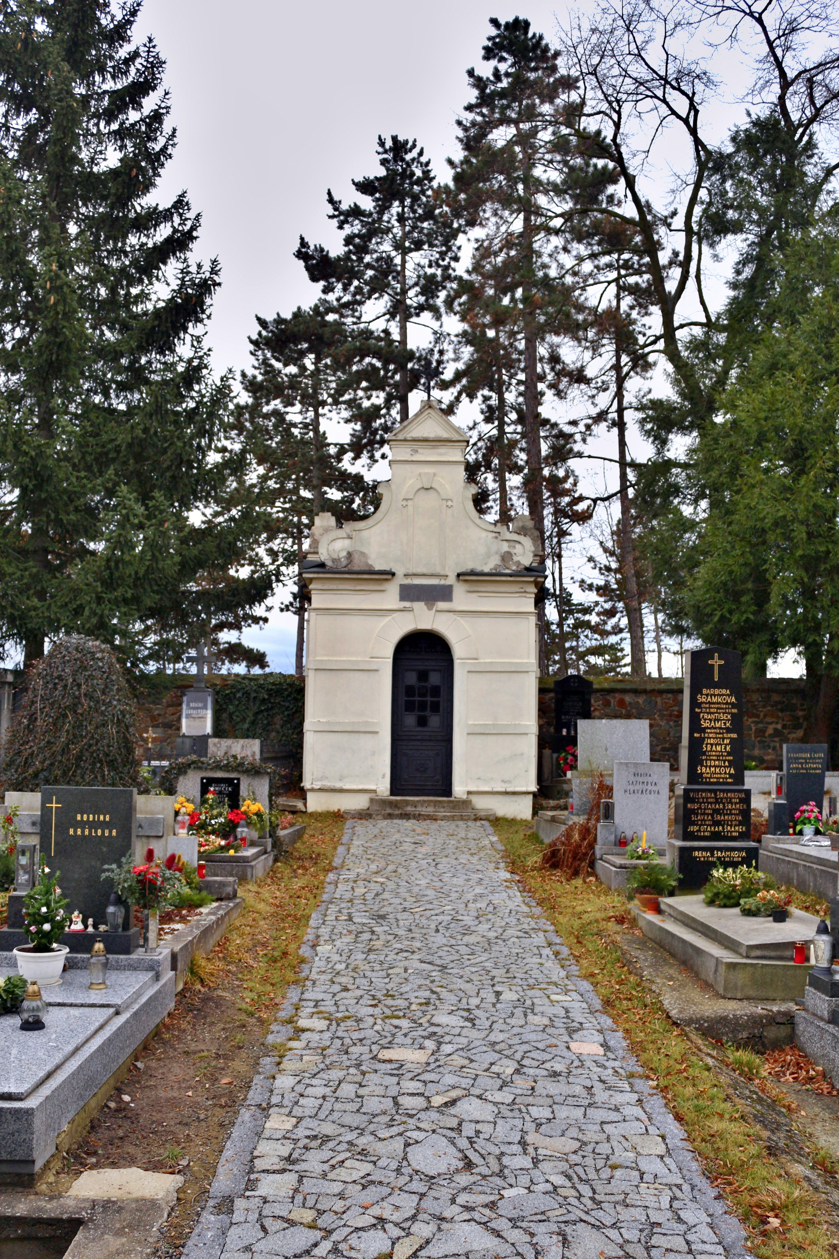 Kostel Narození Panny Marie v Modřanech